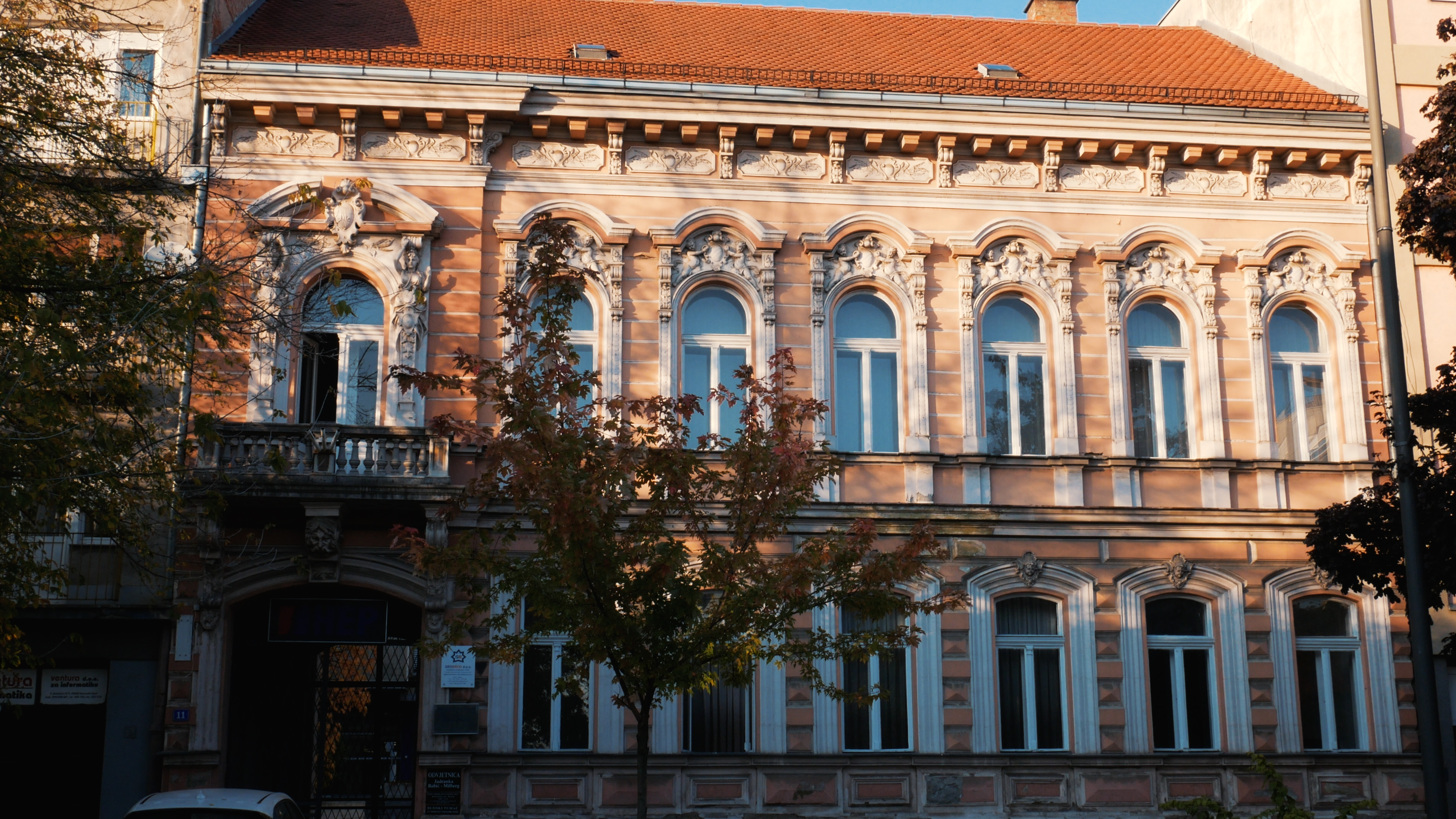 Palača u Neoklasicističkom stilu u Ulici Petra Krešimira IV. u Slavonskom Brodu